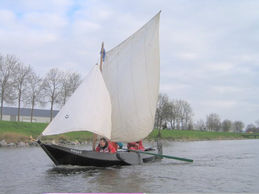 Punter, geroeid en gezeild